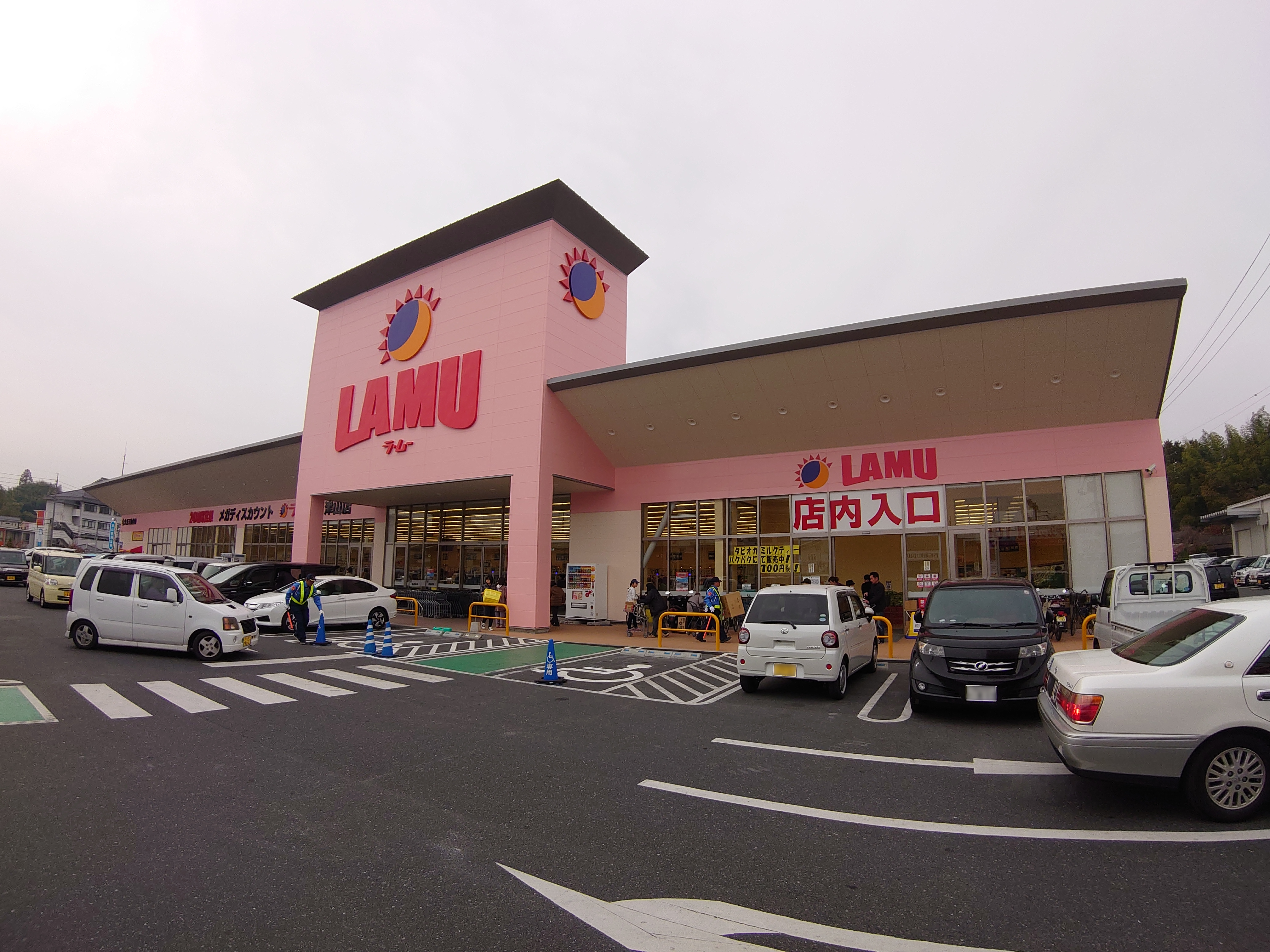 2019年11月24日撮影。ラ・ムー津山店